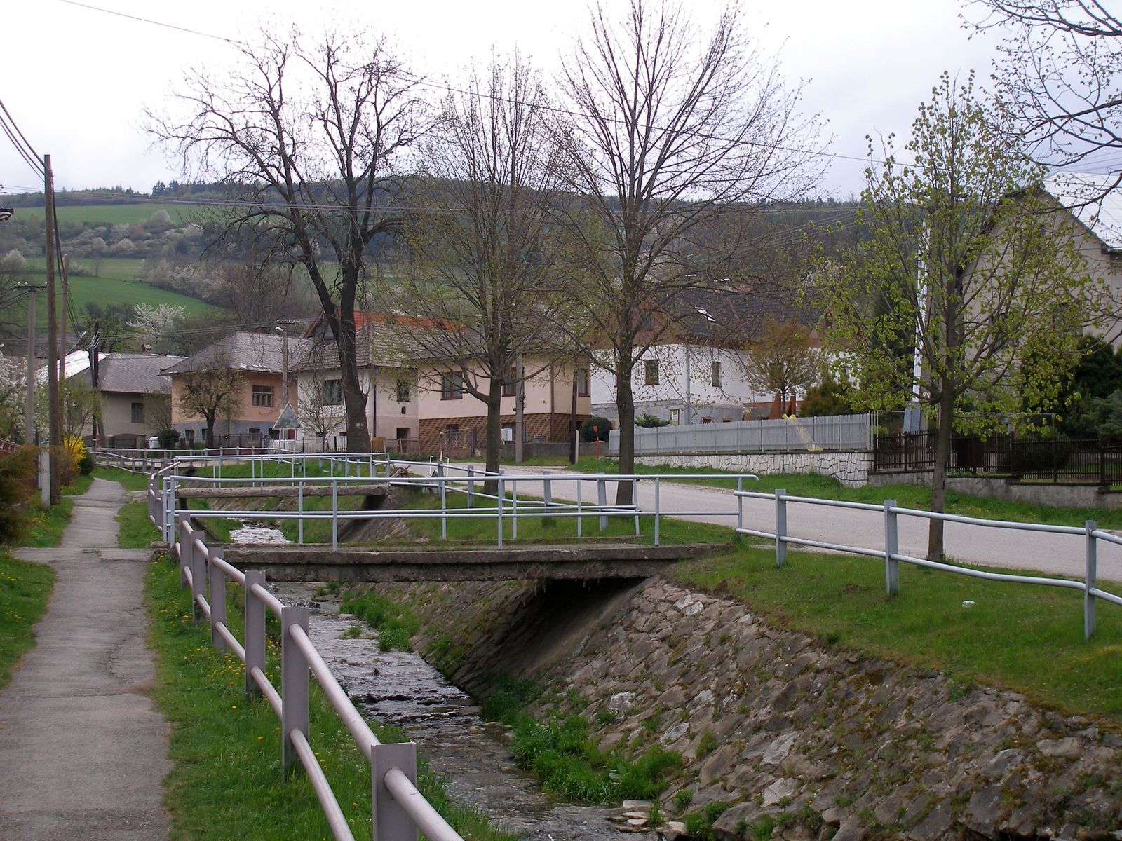 Obec Lipovce okres Prešov región Šariš